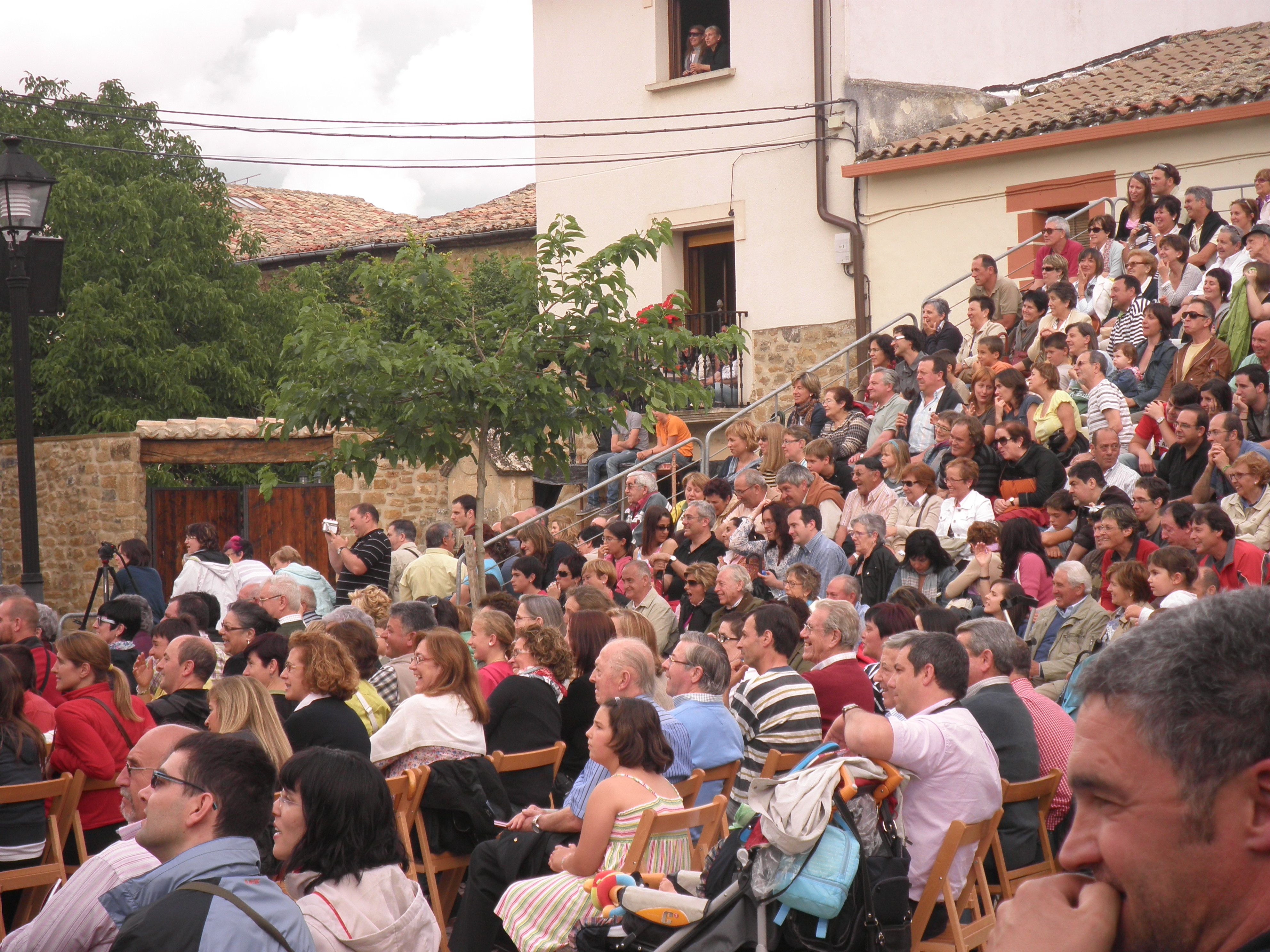 Teatralización "La Batalla de Lácar" Antzezpena